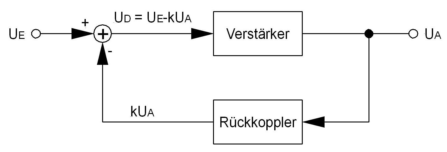 Blockschaltbild eines Rückkopplungskreises mit Gegenkopplung